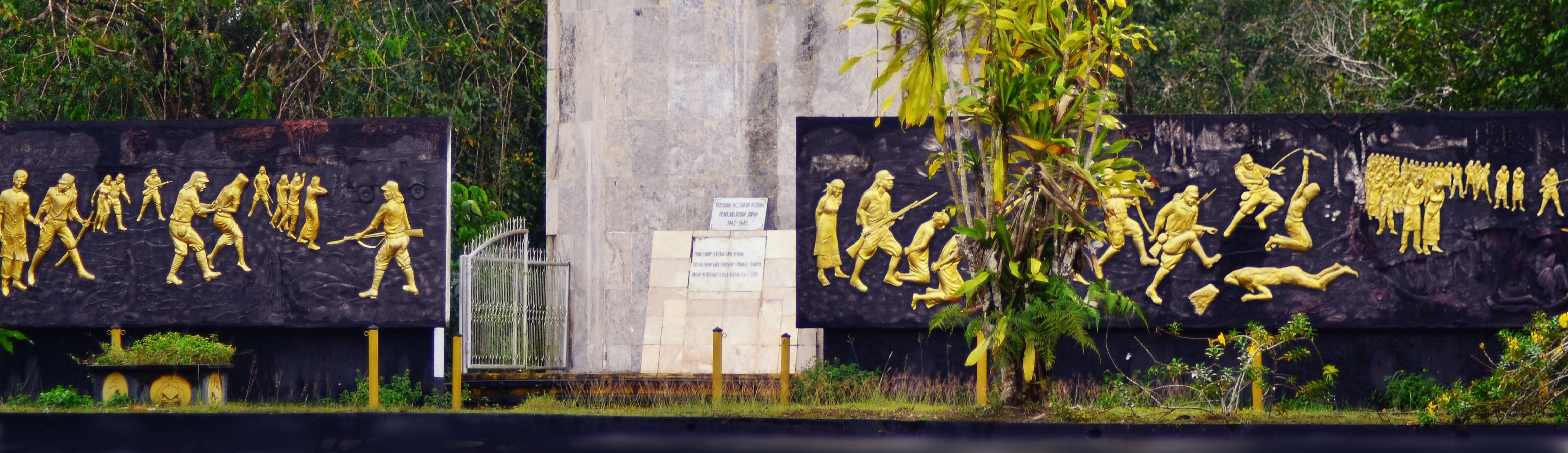 Ada seribu satu kenangan pahit dibalik monumen ini, terkenang di daerah bernama Mandor di provinsi Kalimantan Barat